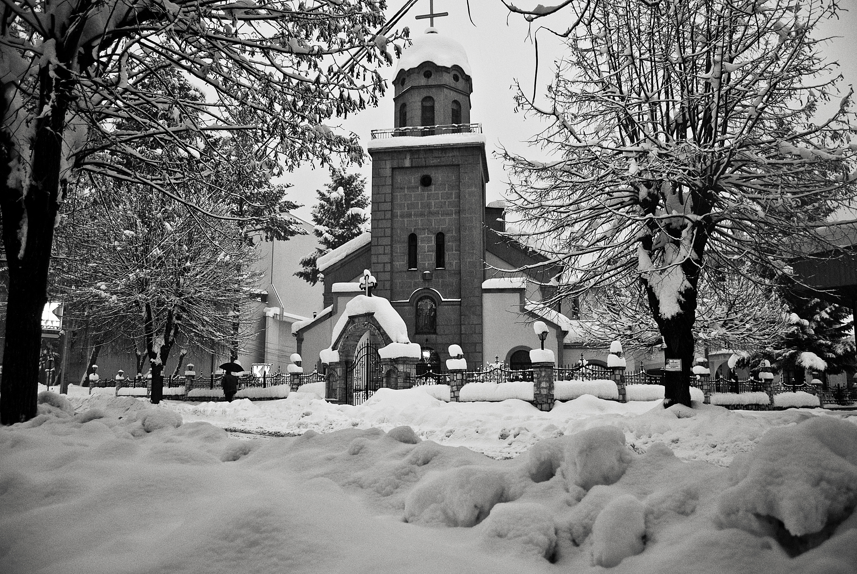 Црква „Св. Петар и Павле“ - Кичево